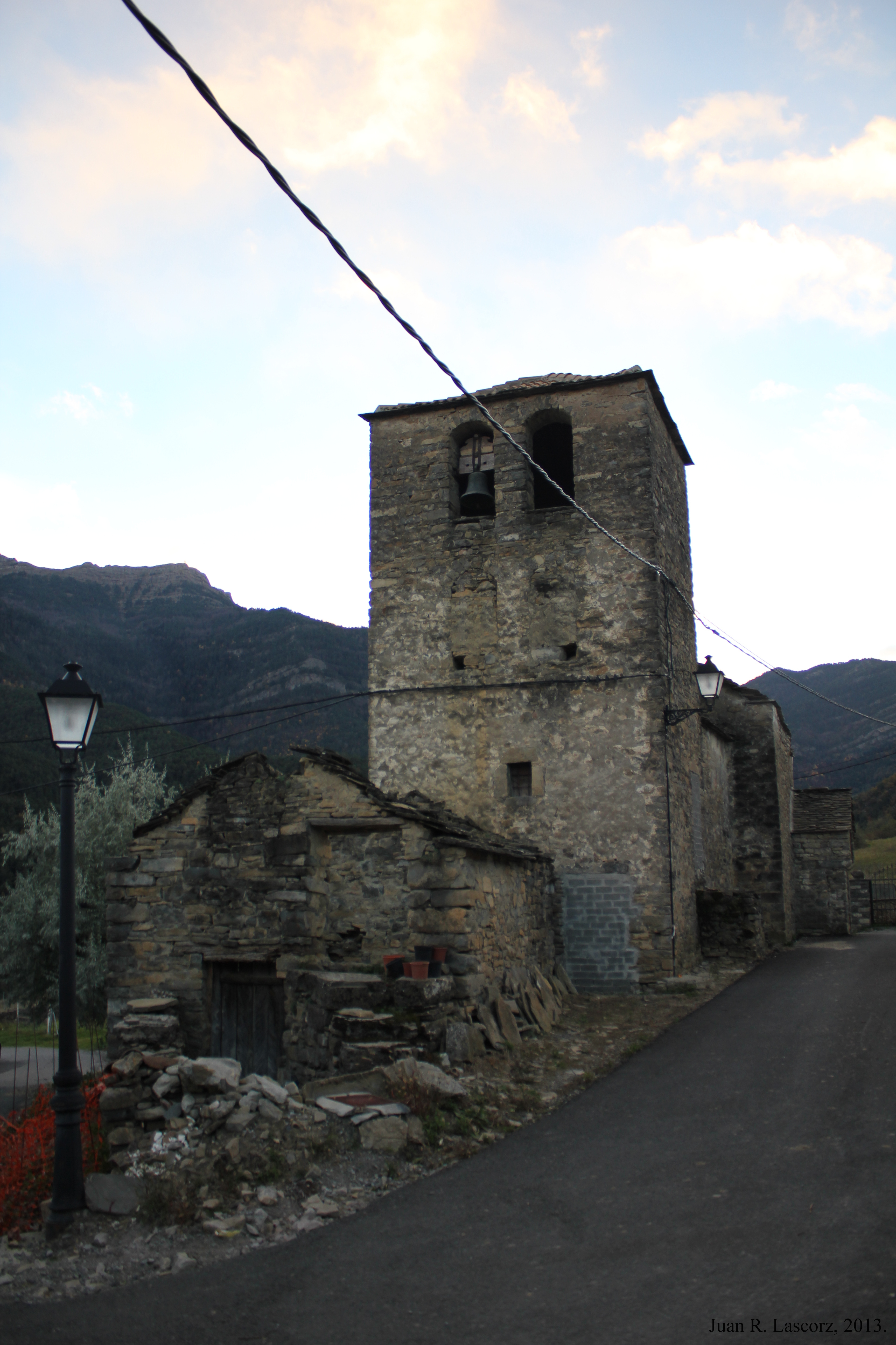 Aragonés: Instantania d'a ilesia parroquial de Lardiés, en Fiscal, Sobrarbe, Uesca. Consagrada a os Santos Reyes. Sieglo XVIII, en 2009 s'espaldó a cubierta.